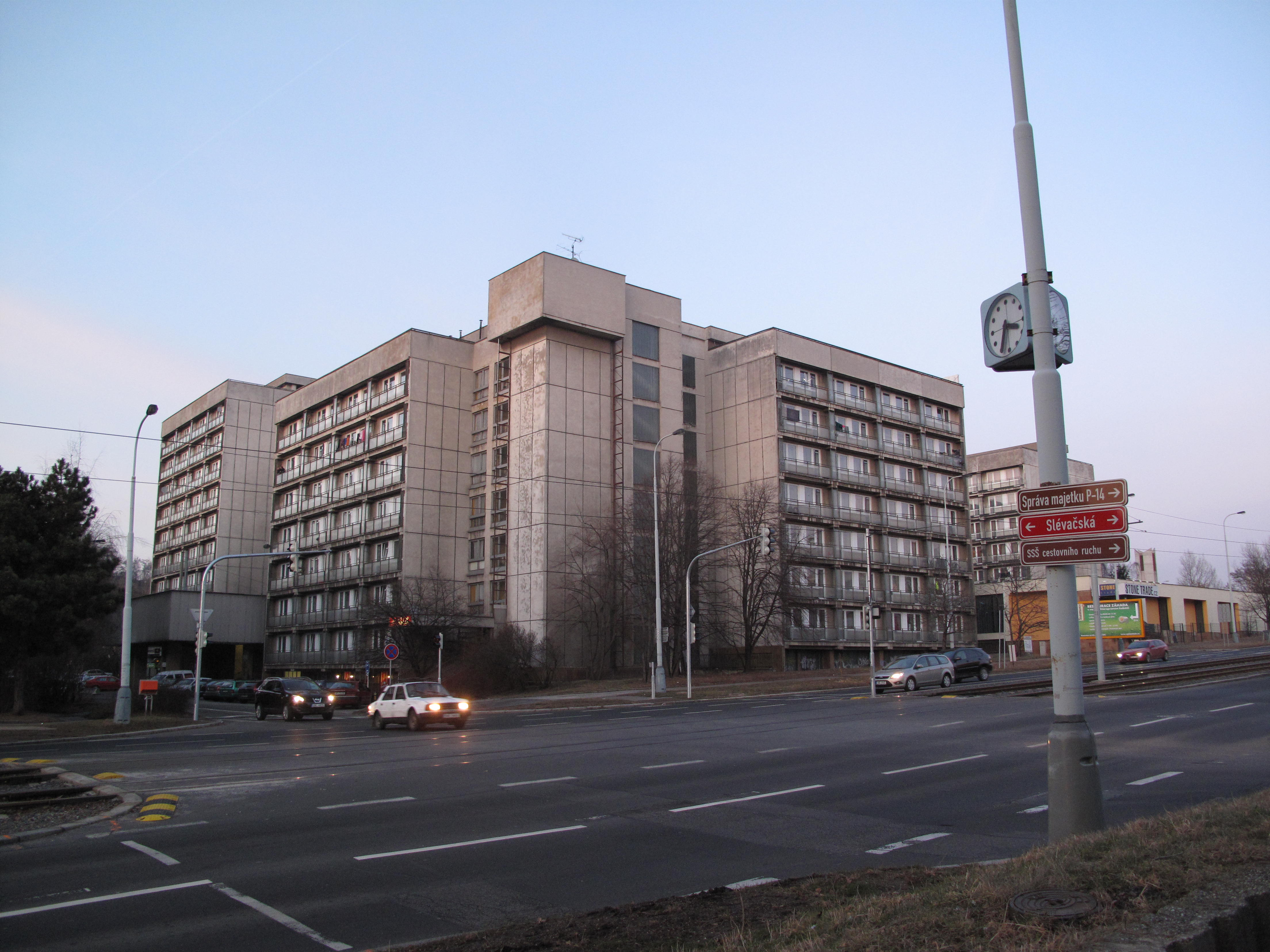 Hloubětín